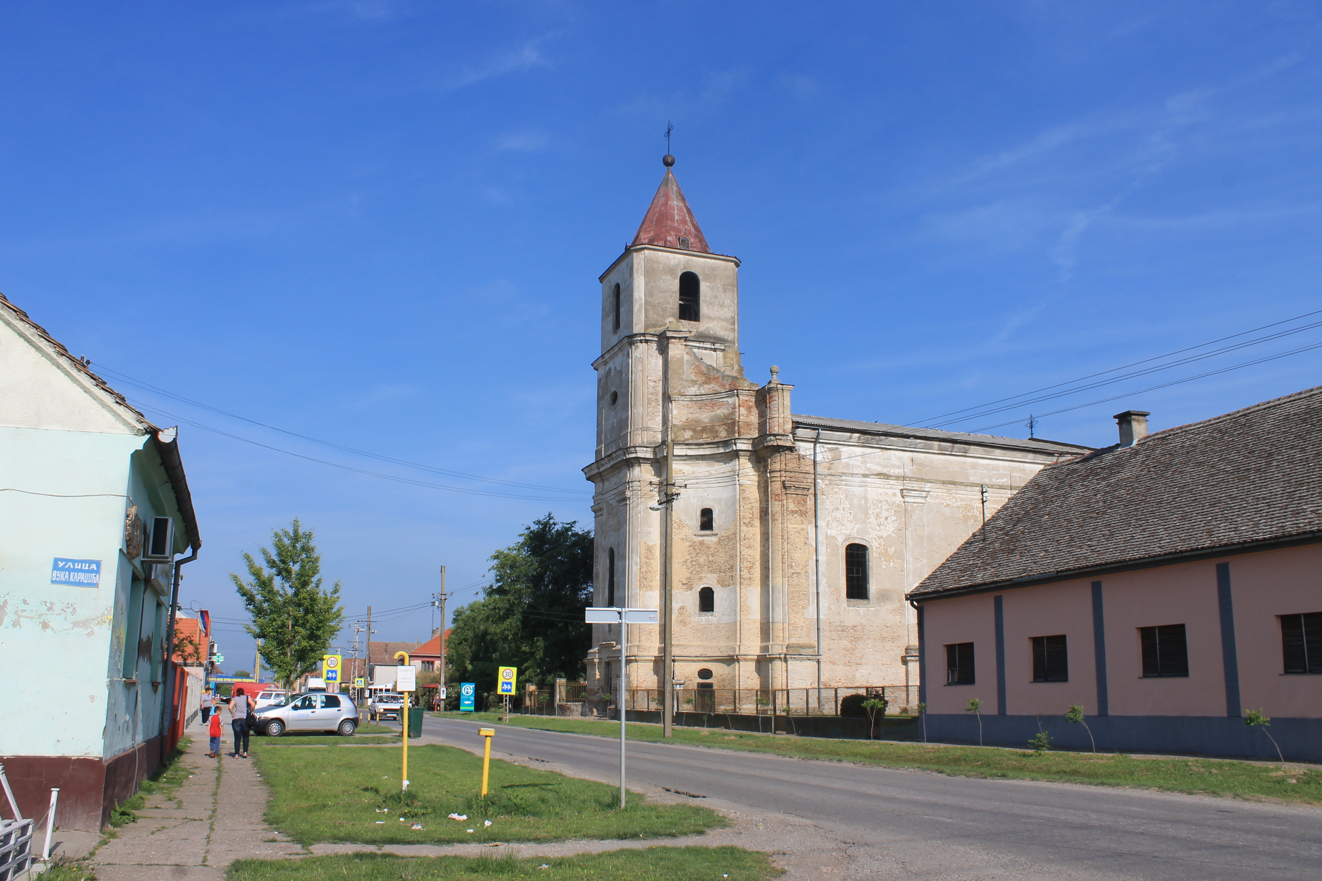 Rimokatolička crkva Svetog Trojstva (Kukujevci)